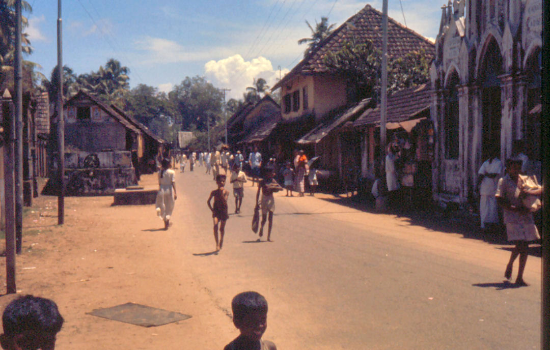 A street in Kochi, India, circa 1960.